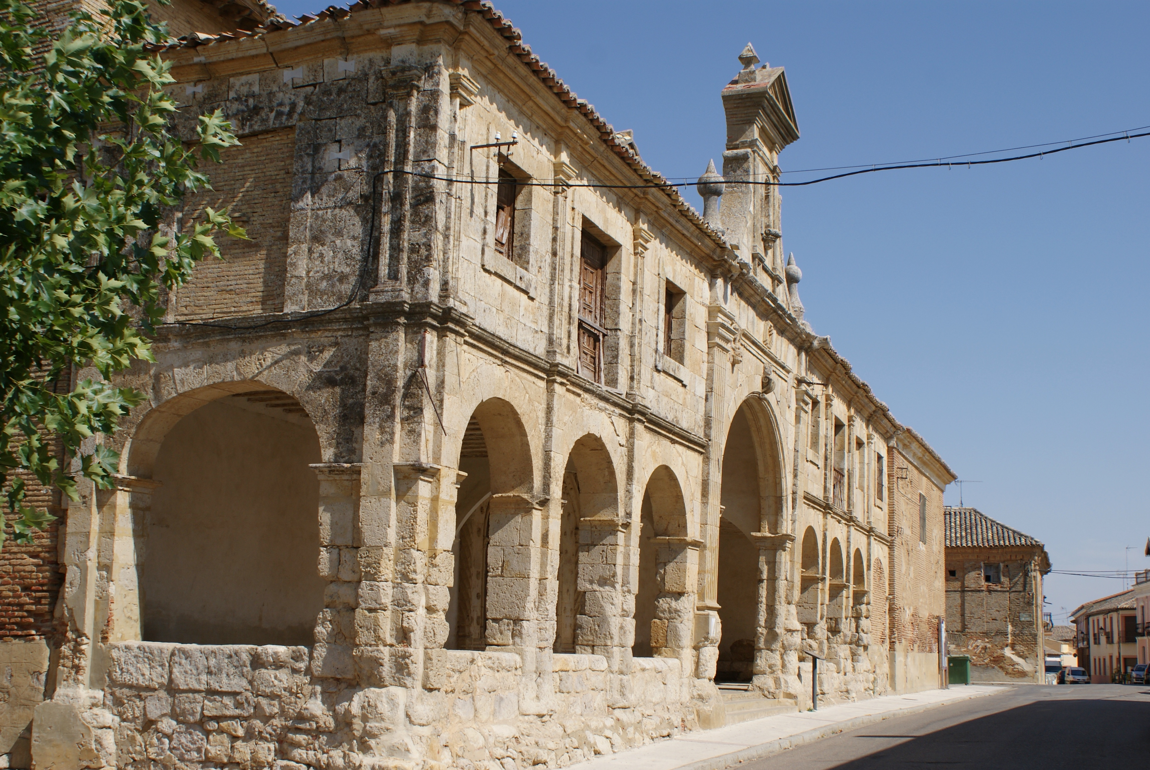 Iglesia de Santa María de Fuentes de Nava (provincia de Palencia, España). Declarada Bien de Interés Cultural.